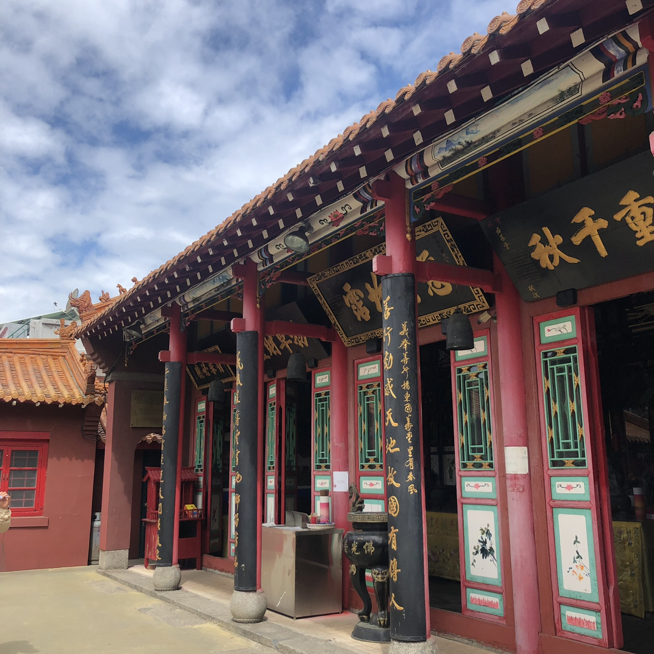 인천 차이나타운에 있는 의선당 내부